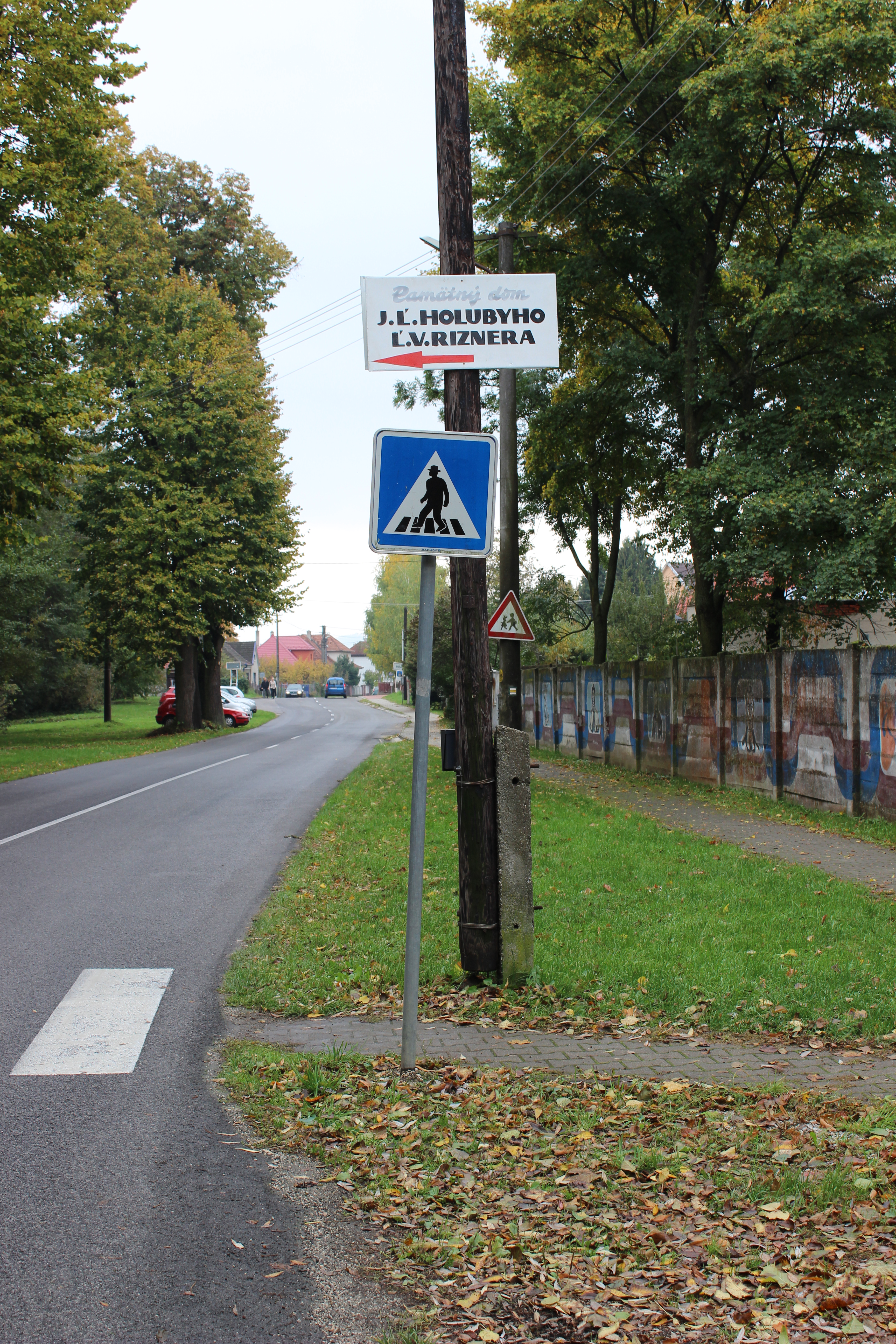 Silnice III/061024 v Zemianskem Podhradie. Označení cesty pro pěší k rodným domům Hoľubyho a Riznera.